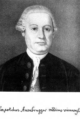 Joseph Leopold Auenbrugger